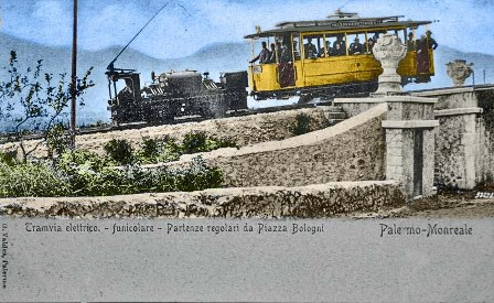 Tram Funicolare Palermo-Monreale